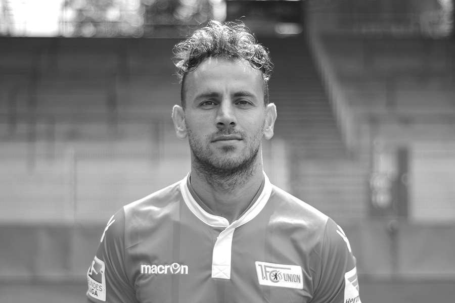 Mannschaftsfoto 2015/16